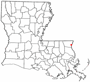 Volapük: Topam in tat: Louisiana.